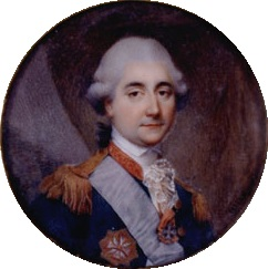 Stanisław August Poniatowski (1732-1798)